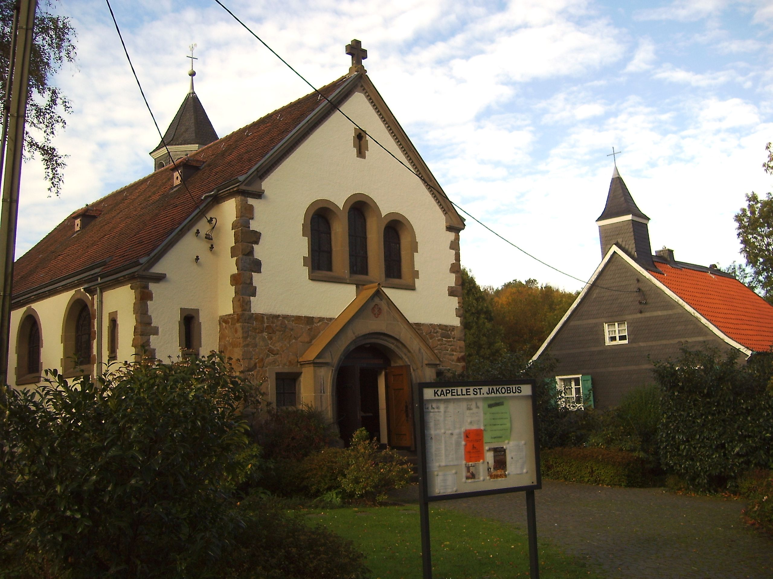 Kapelle Abtsküche, Heiligenhaus